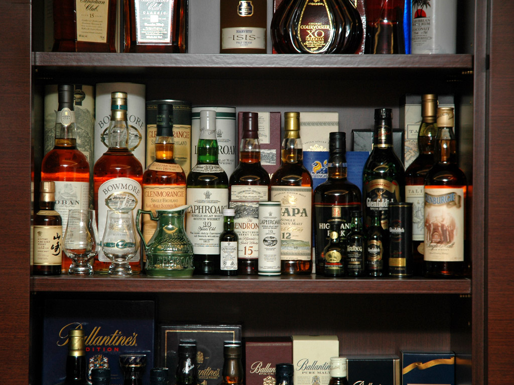 蘇格蘭麥芽威士忌 蘇格蘭地區的麥芽威士忌蒸餾廠為數超過百家，但並不是每一家酒廠的產品都有獨立裝瓶銷售，圖中所見為部分酒廠的單一麥芽威士忌產品。 本圖片由上傳者User:SElephant拍攝於2004年9月。